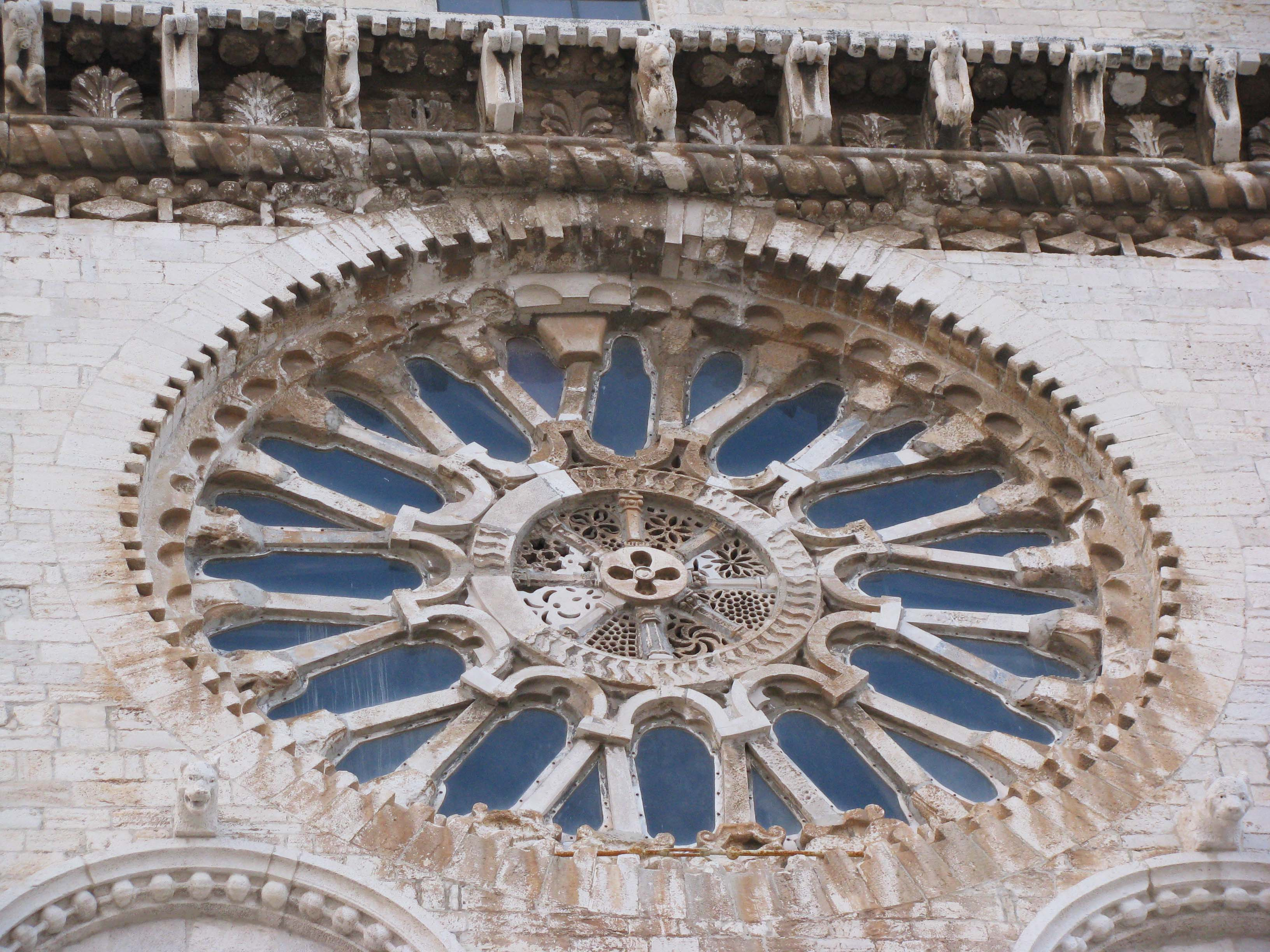 Vista laterale del rosone della Cattedrale di Trani